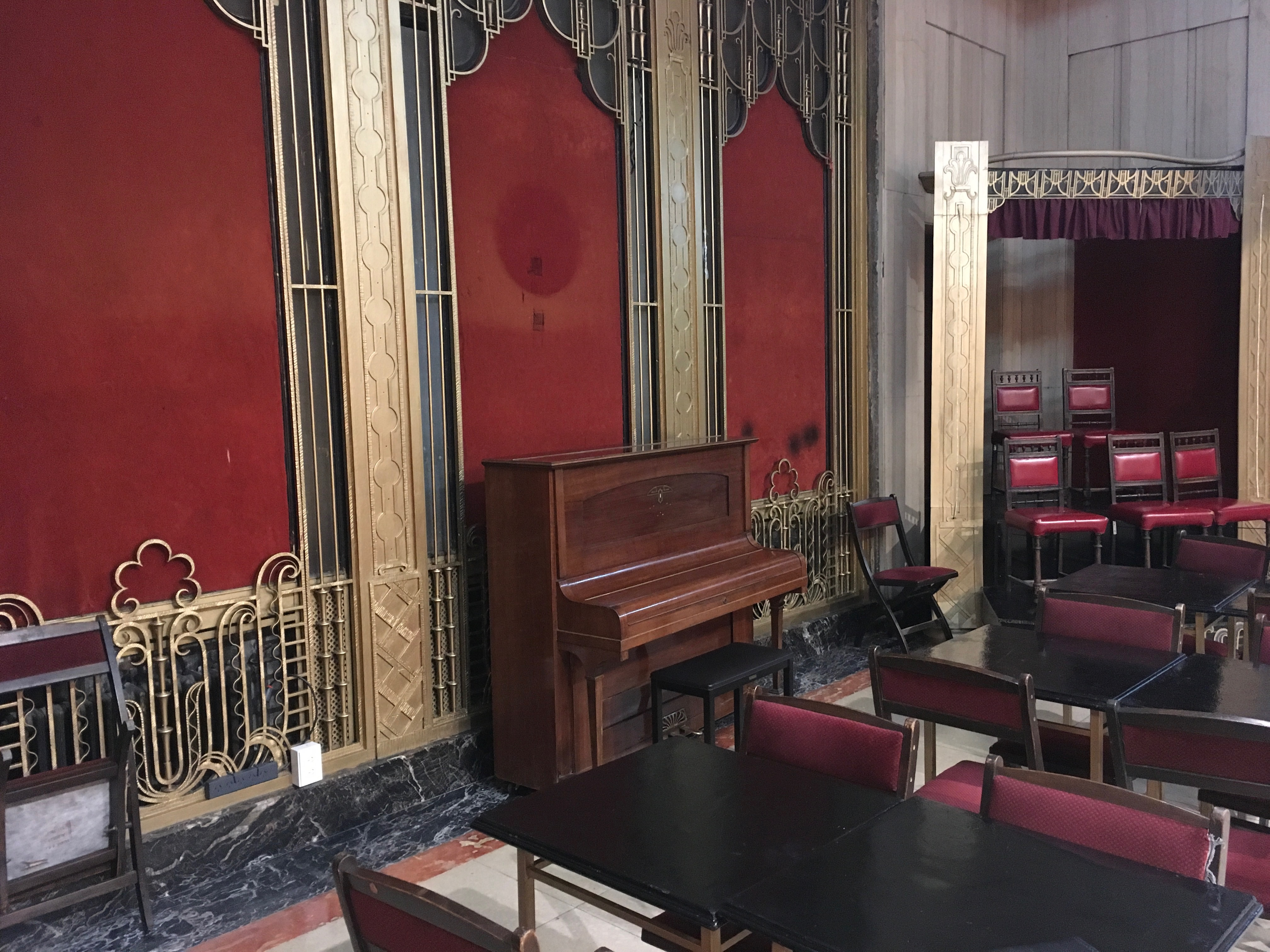 Platea del Teatro Empire. Calle Hipólito Yrigoyen 1934 (Buenos Aires)